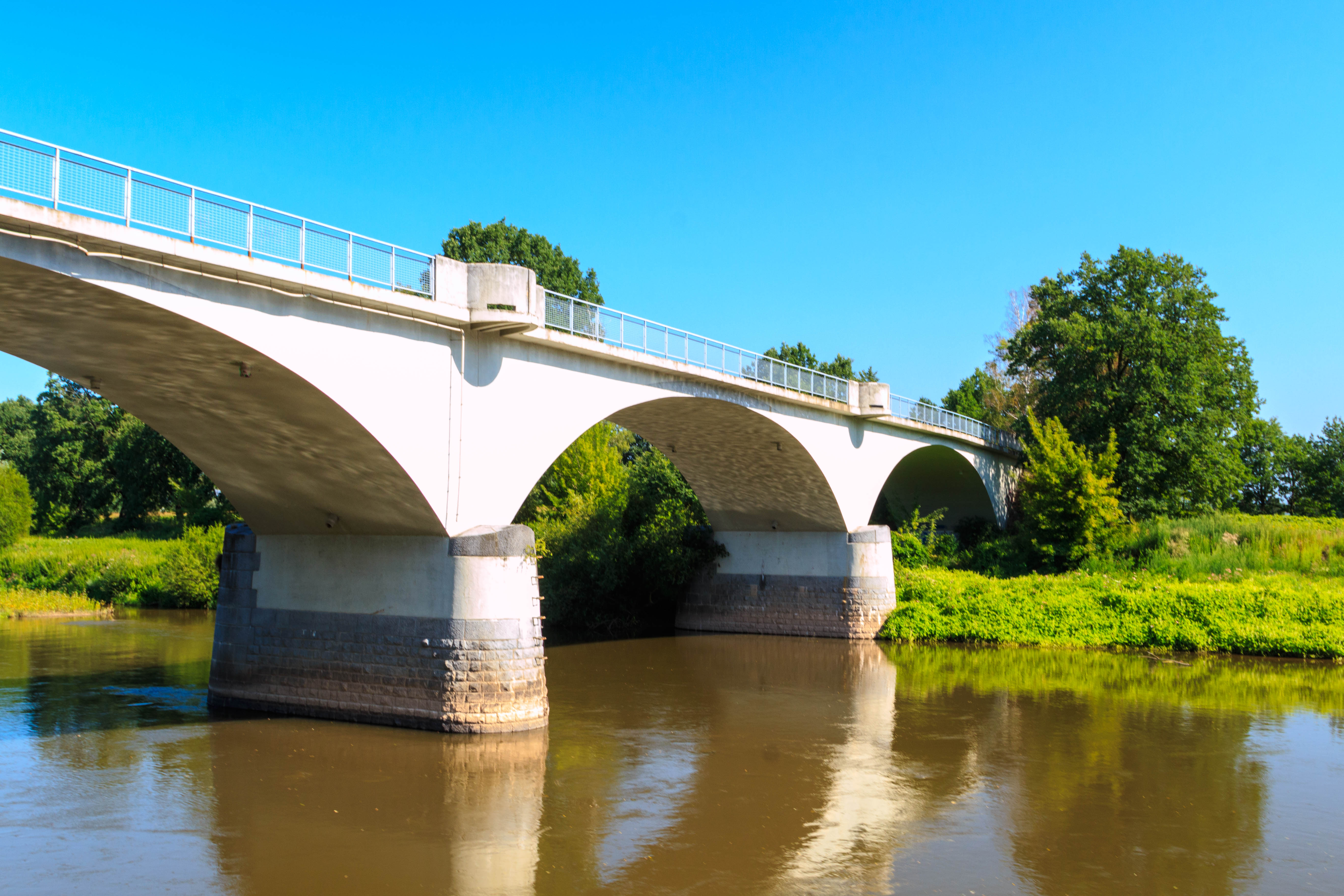 Silniční most, přes Labe, Dříteč.